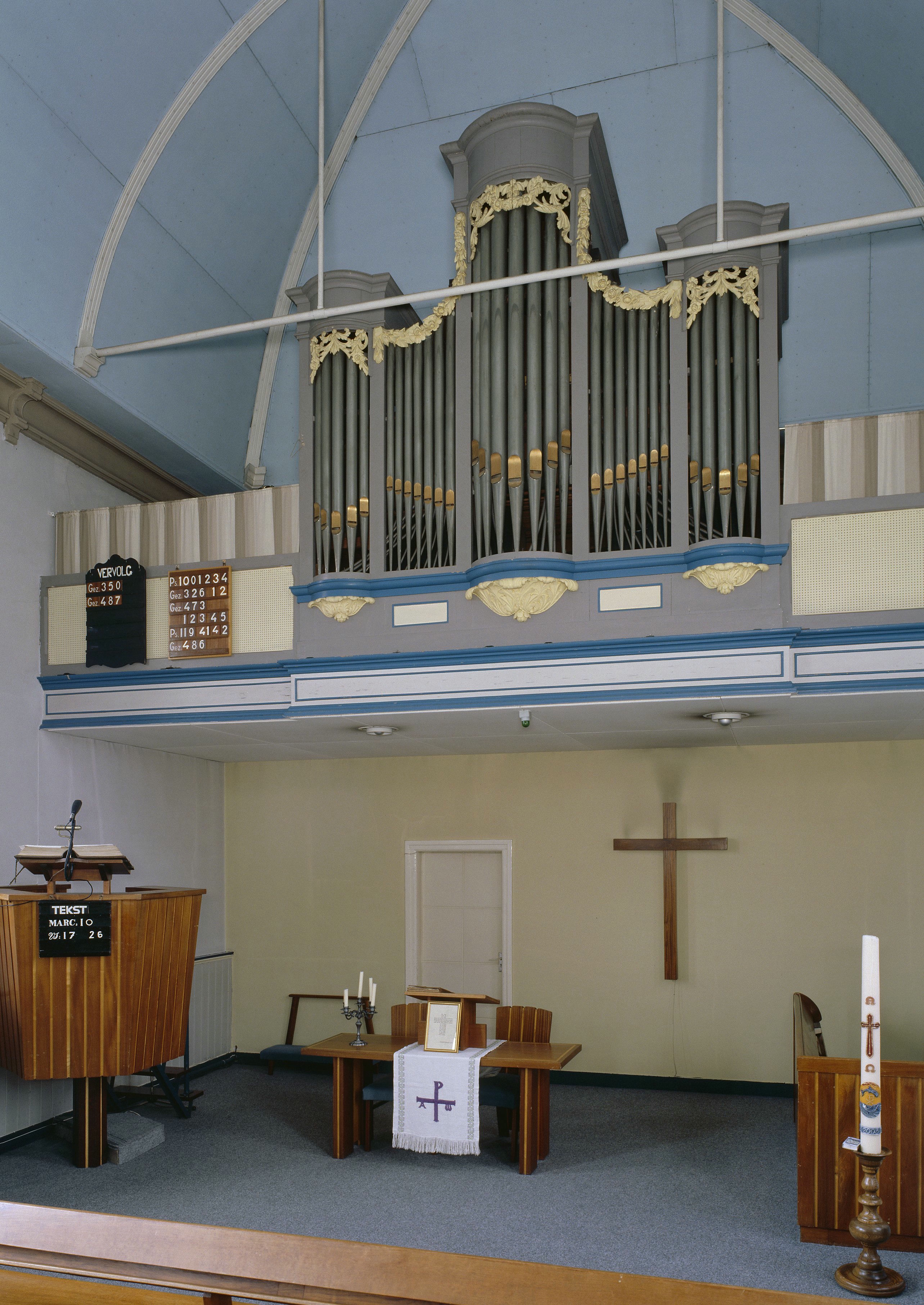 orgel Hervormde Kerk Oudehaske: Interieur, aanzicht orgel, orgelnummer 1191 (opmerking: Gefotografeerd voor Het Historische Orgel in Nederland 1865-1872)